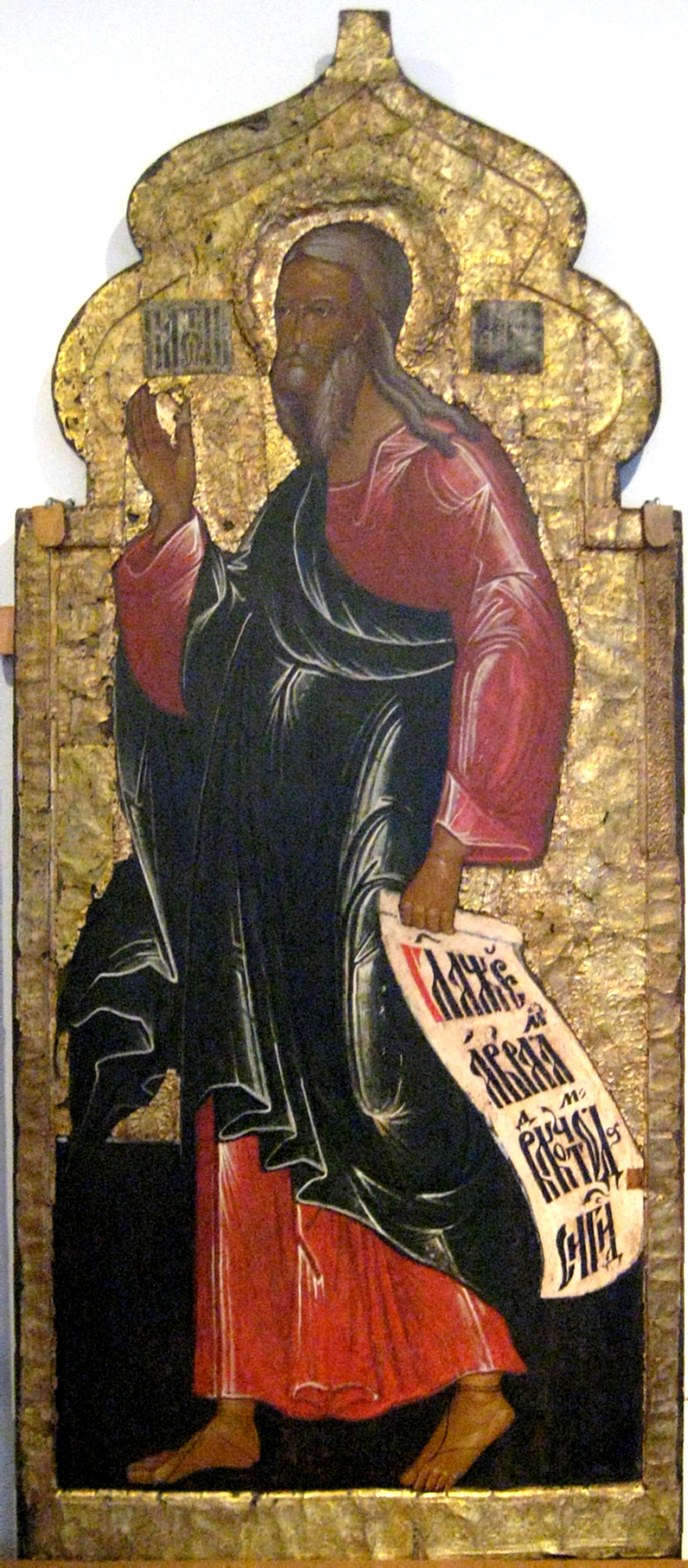 Авраам. Праотеческий ряд. 1630 год. Ждан Дементьев, Вологда. Собор Успения Богородицы, Кирилло-Белозерский монастырь. Музей Кирилло-Белозерского монастыря